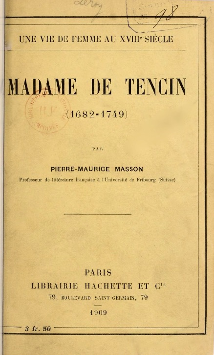 Pierre-Maurice Masson, Une vue de femme au XVIIie siècle : Madame de Tencin (1682-1749), édition 1909, couverture.